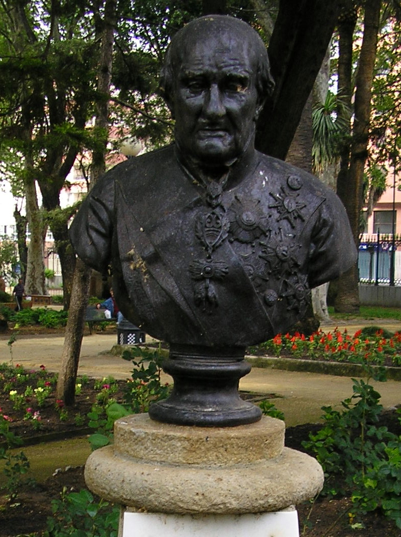 Busto del general español Francisco Javier Castaños situado en el Parque María Cristina de la ciudad de Algeciras, en Andalucía, (España). Es una reproducción de 1948 del busto en bronce realizado en 1853 por Josep Piquer y Duart basado a su vez en un retrato de Vicente López Portaña.